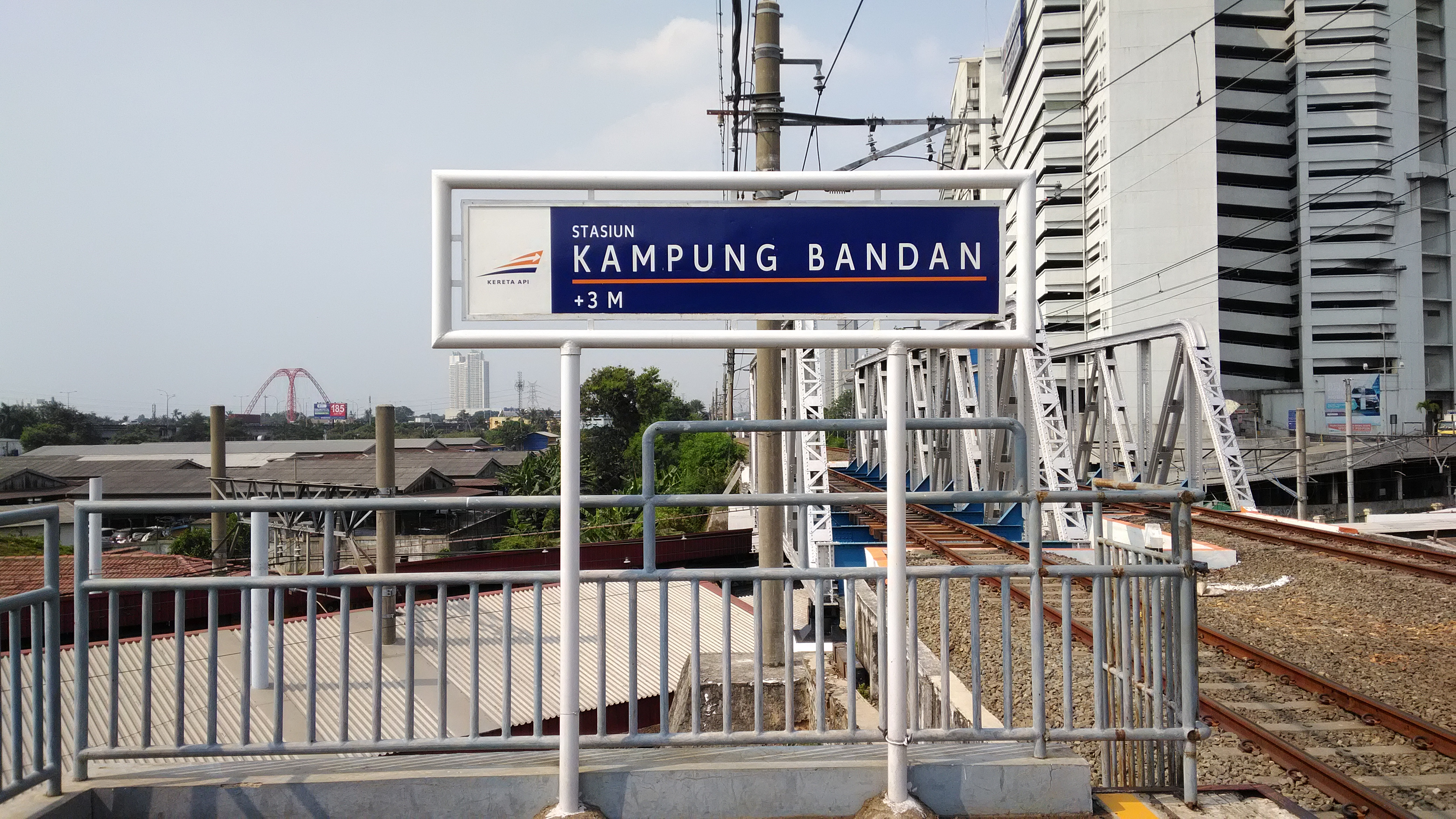 Sunda: Papan Ngaran Anyar Stasion Kampung Bandan versi 2017